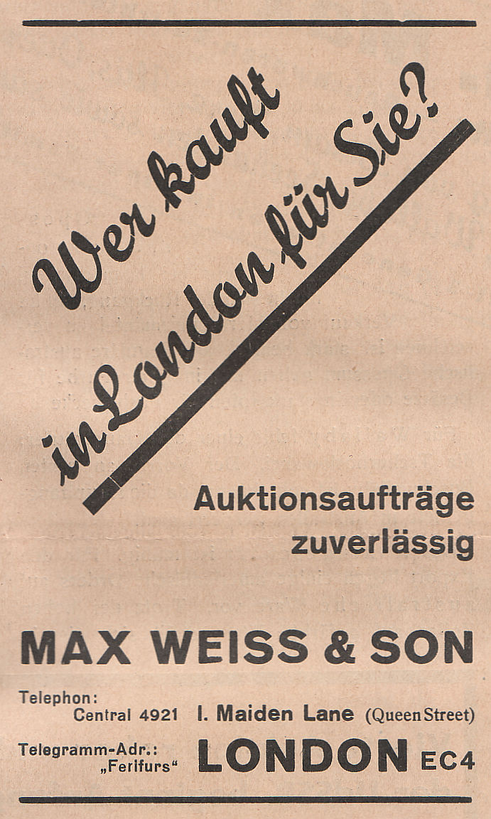 Anzeige der Rauchwarenhändler (Fellhandel) Max Weiss & Son, London EC4, 1. Maiden Lane (Queen Street). Wer kauft in London für Sie? Auktionsaufträge zuverlässig.